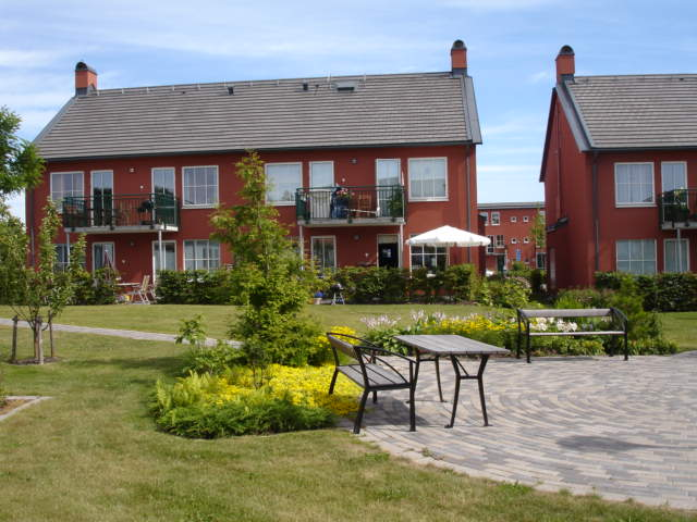 Amhult Garden City